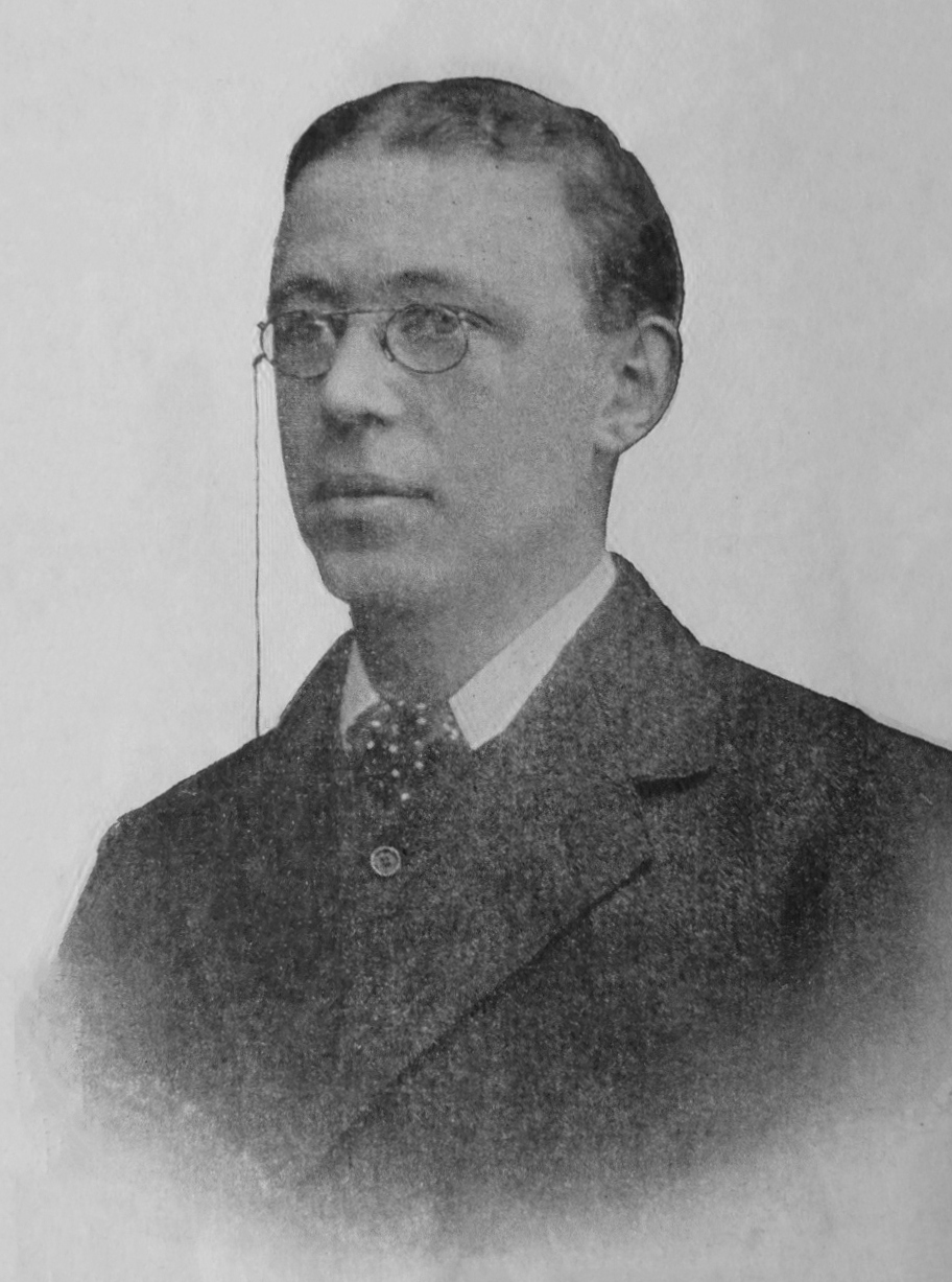 Ben Spoor